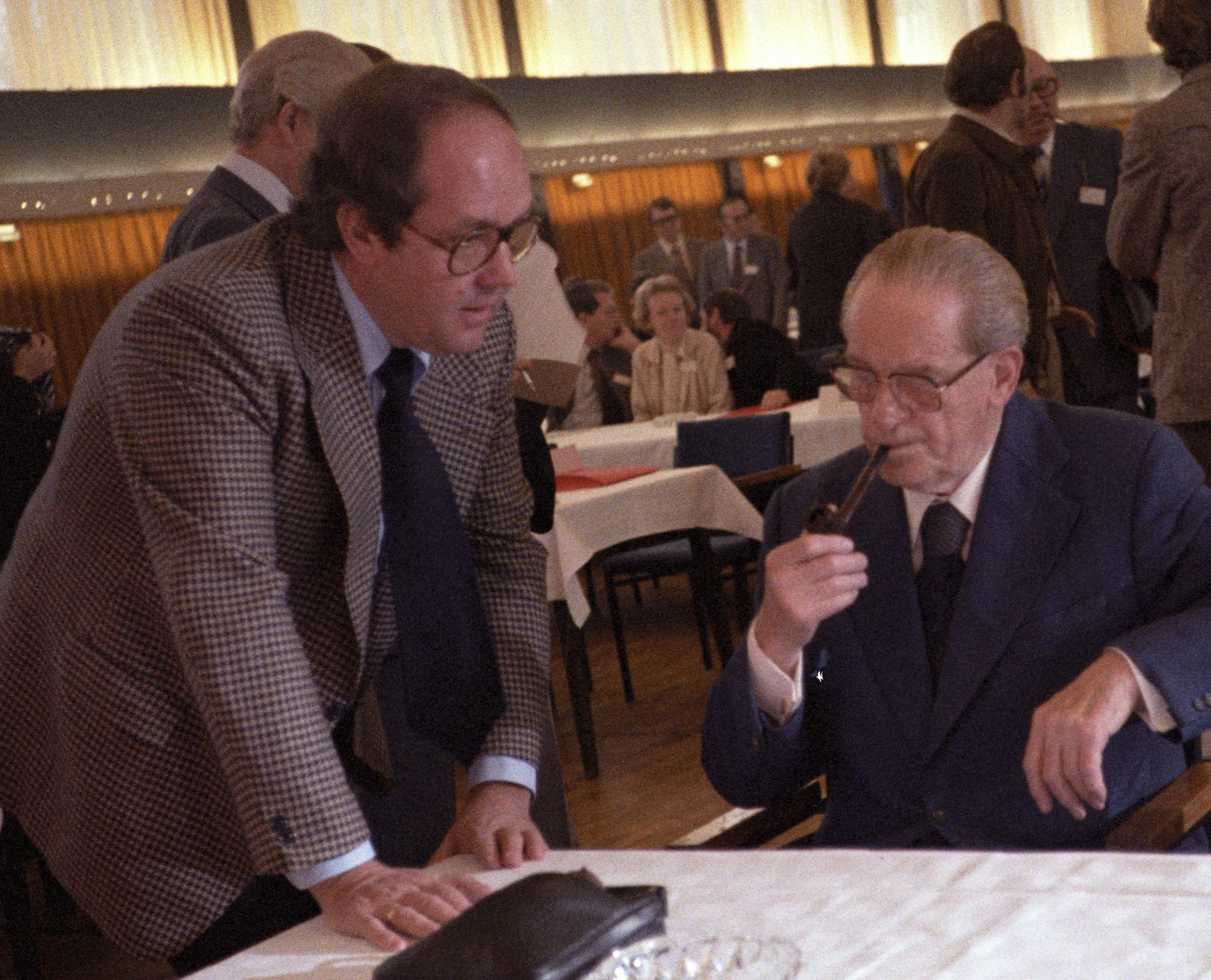 Innensenator Werner Staak (links) begrüßt Herbert Wehner auf einem Landesparteitag in Hamburg